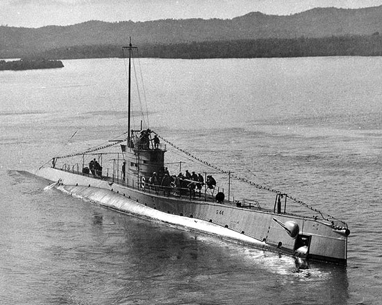 US Navy file photo